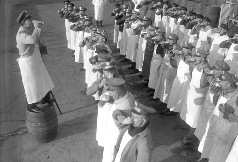 Der Berliner Bierstreik ist beendet! Die Bierkutscher eines grossen Brauerei Unternehmens trinken vor ihrer ersten Ausfahrt ein Glas Bier zum Wohl für die glückliche Beendigung des Streikes.